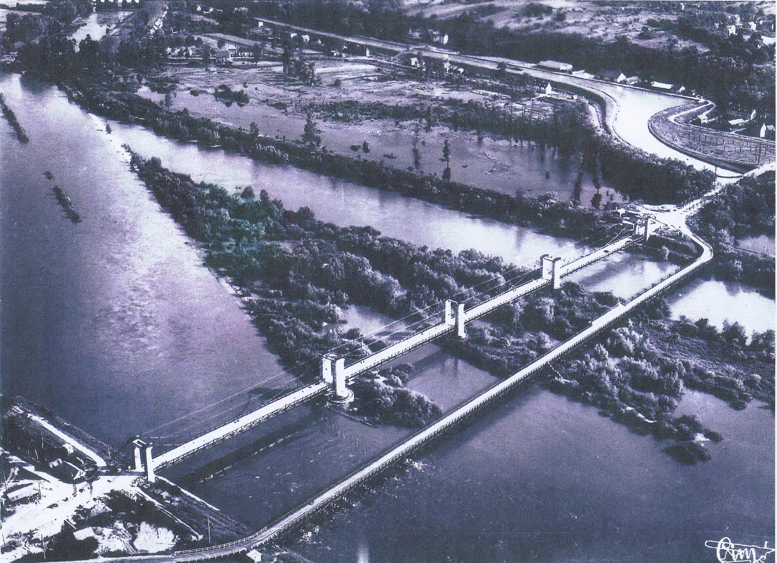 Pont temporaire à côté du pont de Châtillon sur Loire durant la seconde guerre mondiale.